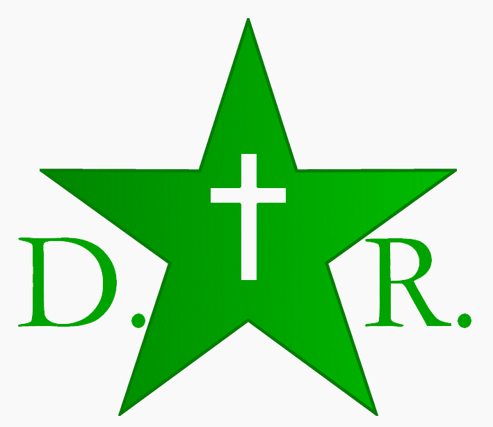 Proponita emblemo por la "Societo Esperanto en la servo de la Dia Regno" de William Page en 1910